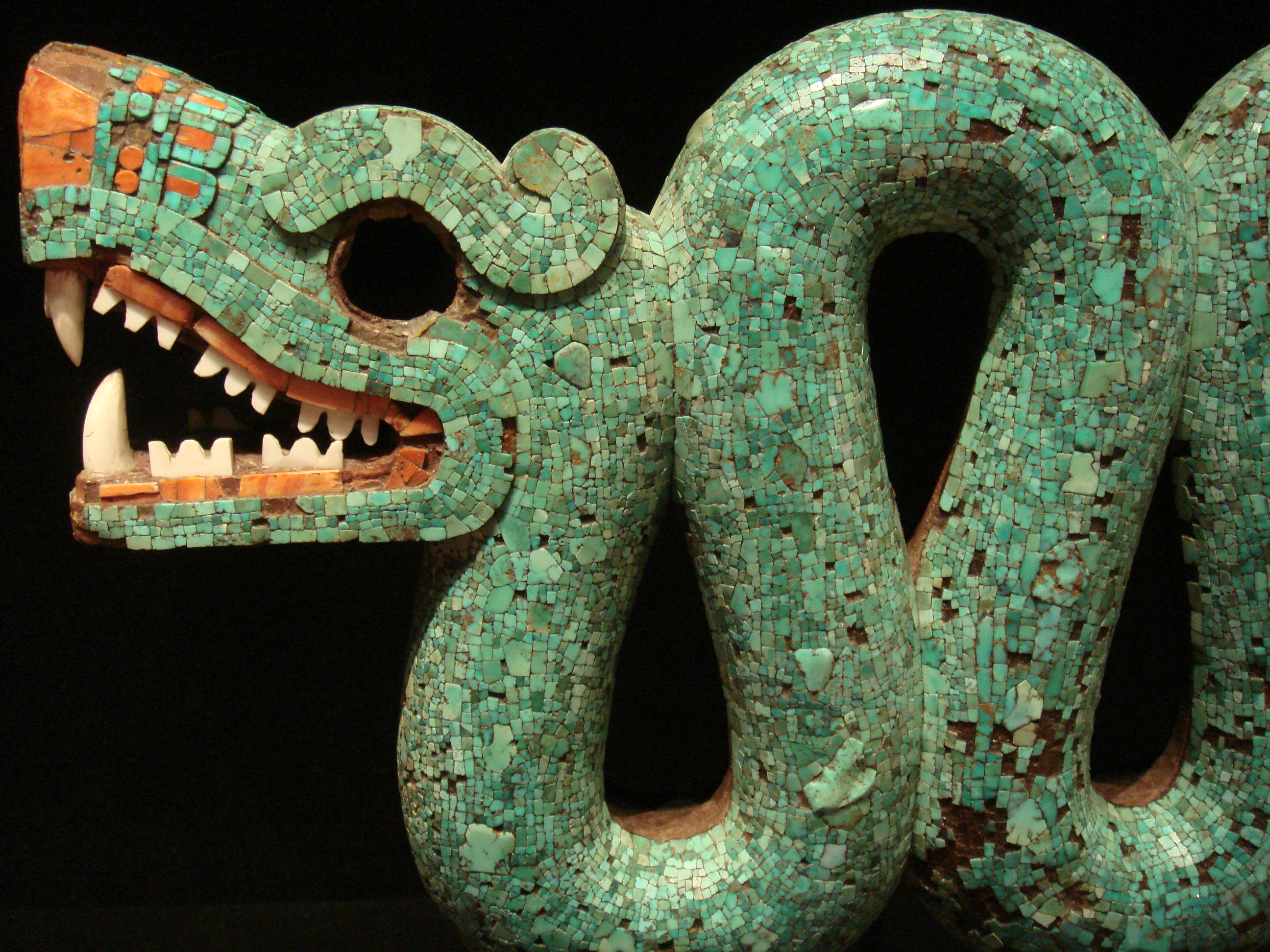 Serpiente bicéfala de mosaico de turquesa. British Museum. Arte azteca (mixteca) o mexica.